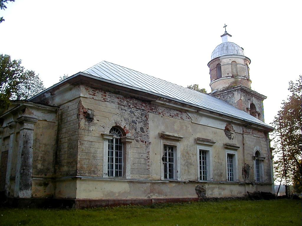 Jaunsaules luterāņu baznīca 2000-09-02